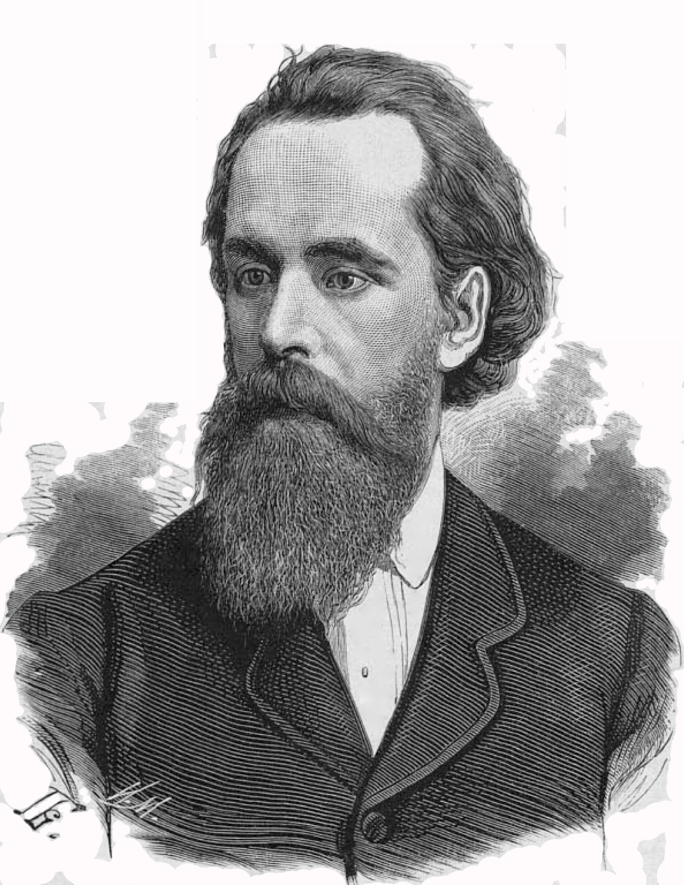 Третьяков Сергей Михайлович, меценат